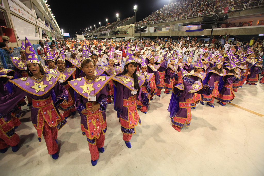 Rio de Janeiro - Pequenos sambistas fecham desfiles na Marquês de Sapucaí.